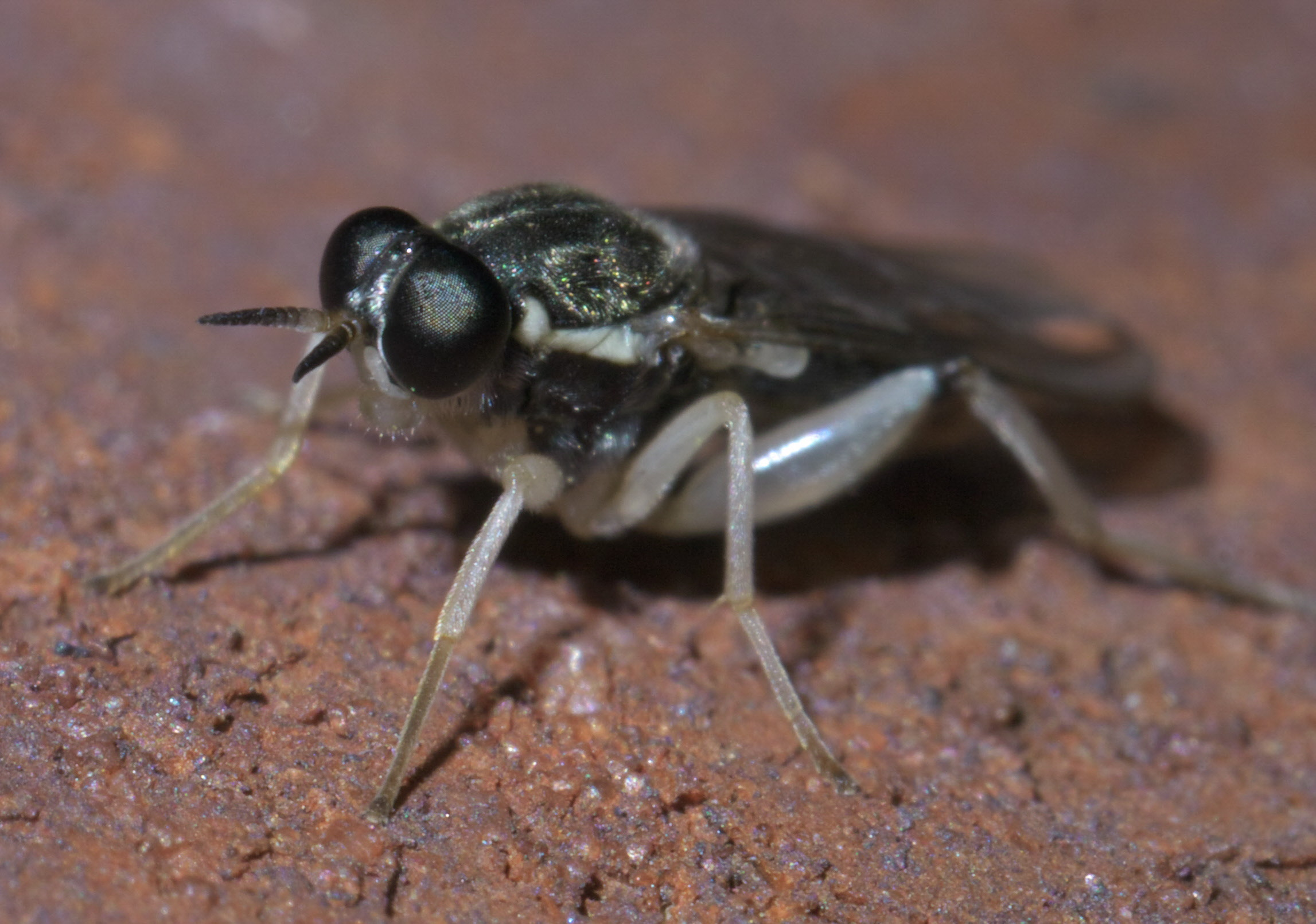 Solva pallipes, Order: Flies, ID Confidence: 87